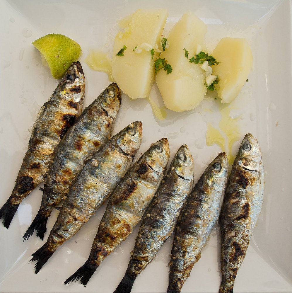 Sardinen in einem Restaurant in Faro, Portugal